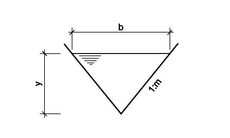 jednoduche schema trojuhelnikoveho koryta